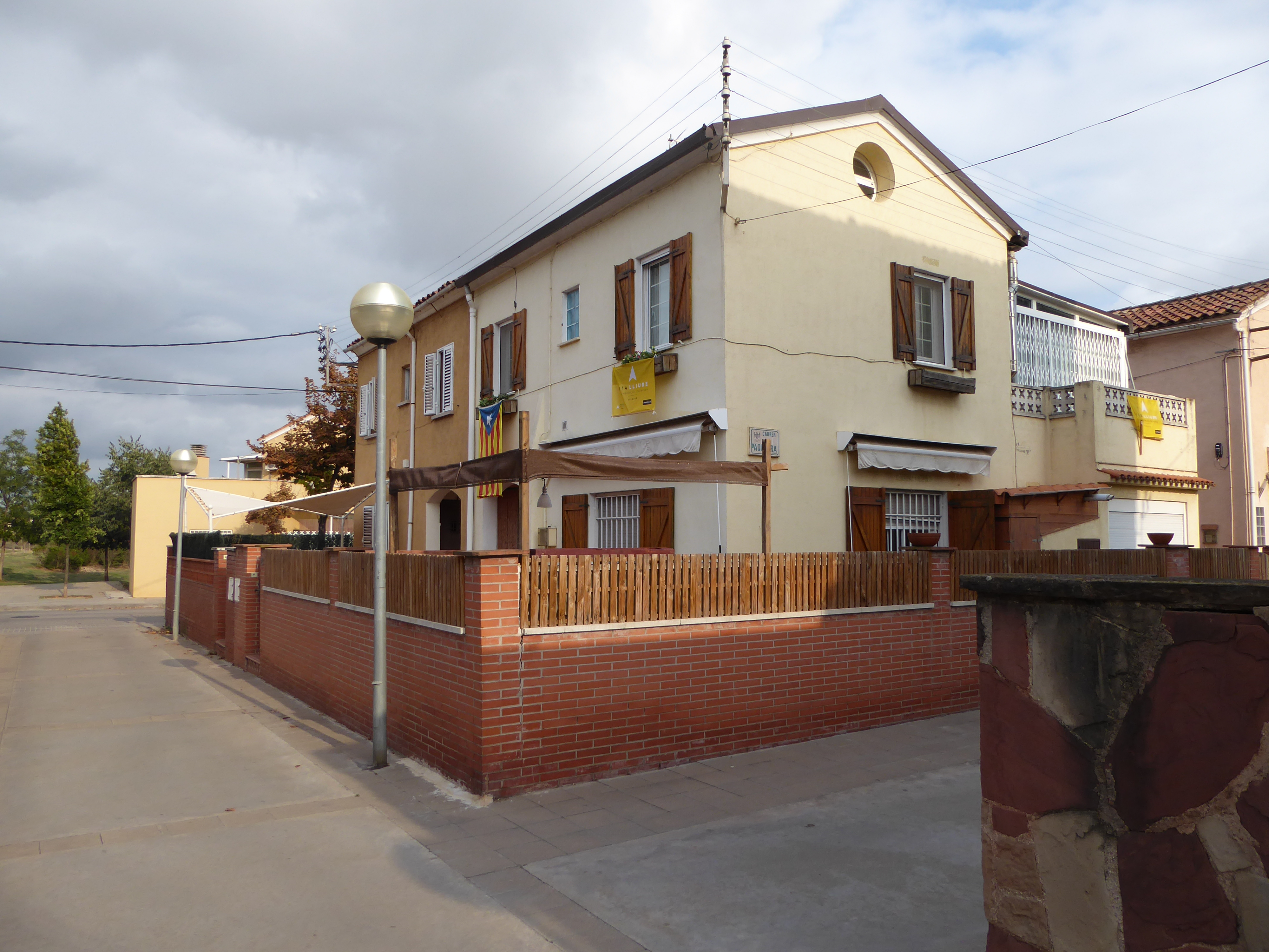 Barri de Nostra Llar, fet construir per Josep Garcia-Planas